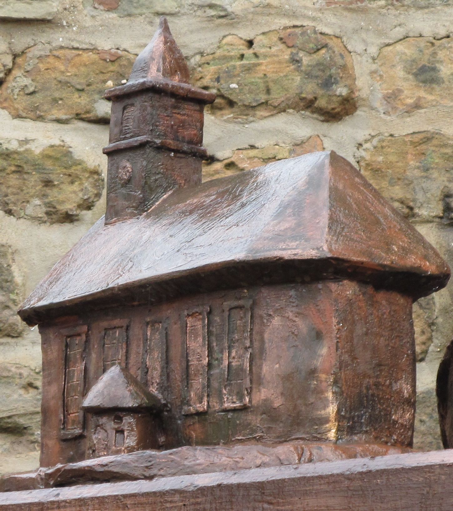 Modell der alten Mauritiuskirche in Lautzkirchen, einem Stadtteil von Blieskastel, Saarland